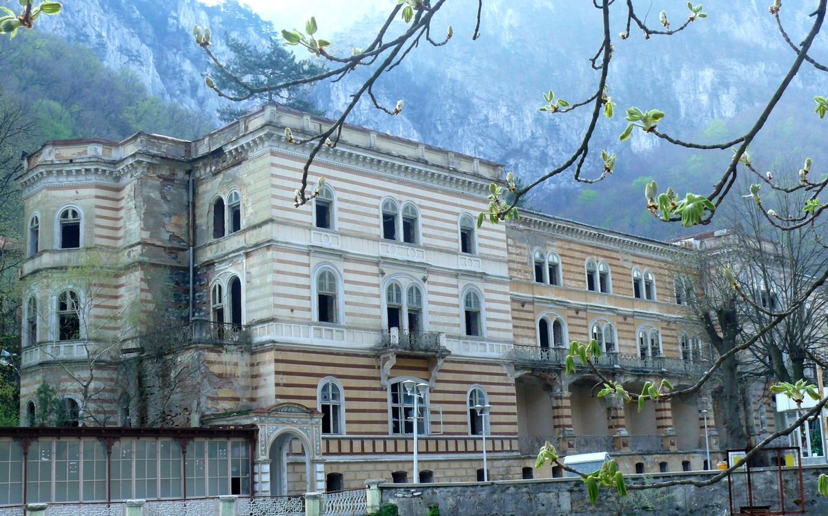 Hotel "Decebal", fost Hotel "Ferdinand"